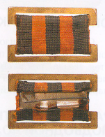 Советский гвардейский знак, использовавшийся в Военно-Морском Флоте СССР. Принадлежал контр-адмиралу ВМФ СССР А. М. Гущину.